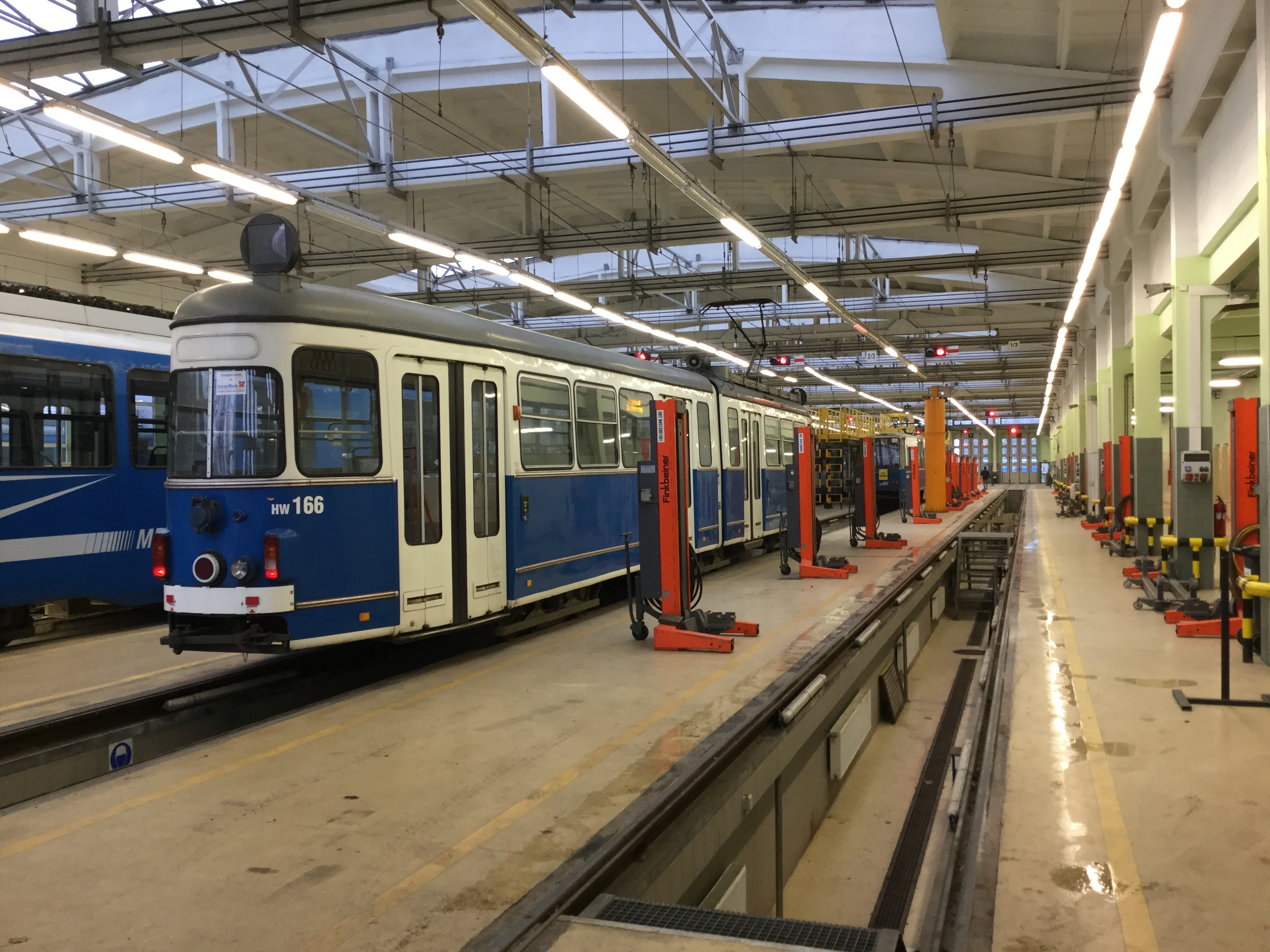 Wnętrze zajezdni tramwajowej Nowa Huta w Krakowie.